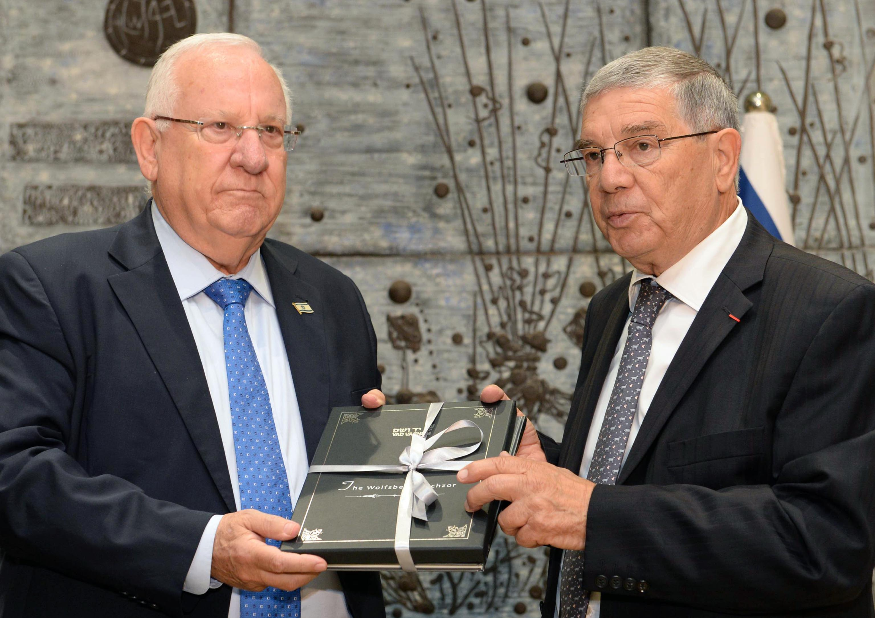 נשיא מדינת ישראל ראובן ריבלין מקבל מאבנר שלו, יו"ר הנהלת 'יד ושם', העתק של מחזור תפילה לראש השנה שכתב מתוך הזיכרון, מר נפתלי שטרן, ניצול שואה, בעת שהותו במחנה עבודה.